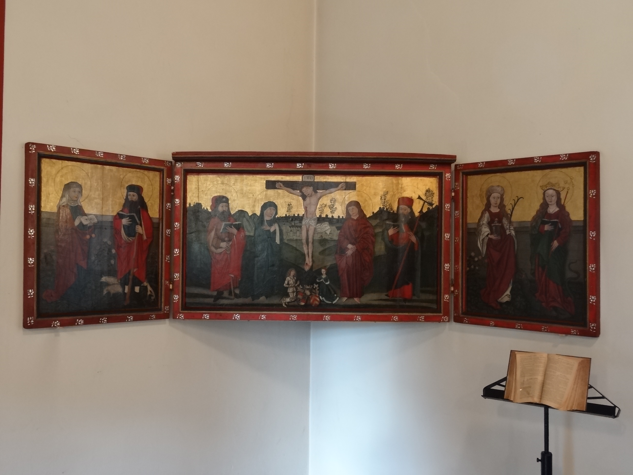 Evangelische Kirche (Hattenrod)Evangelische Kirche (Hattenrod)